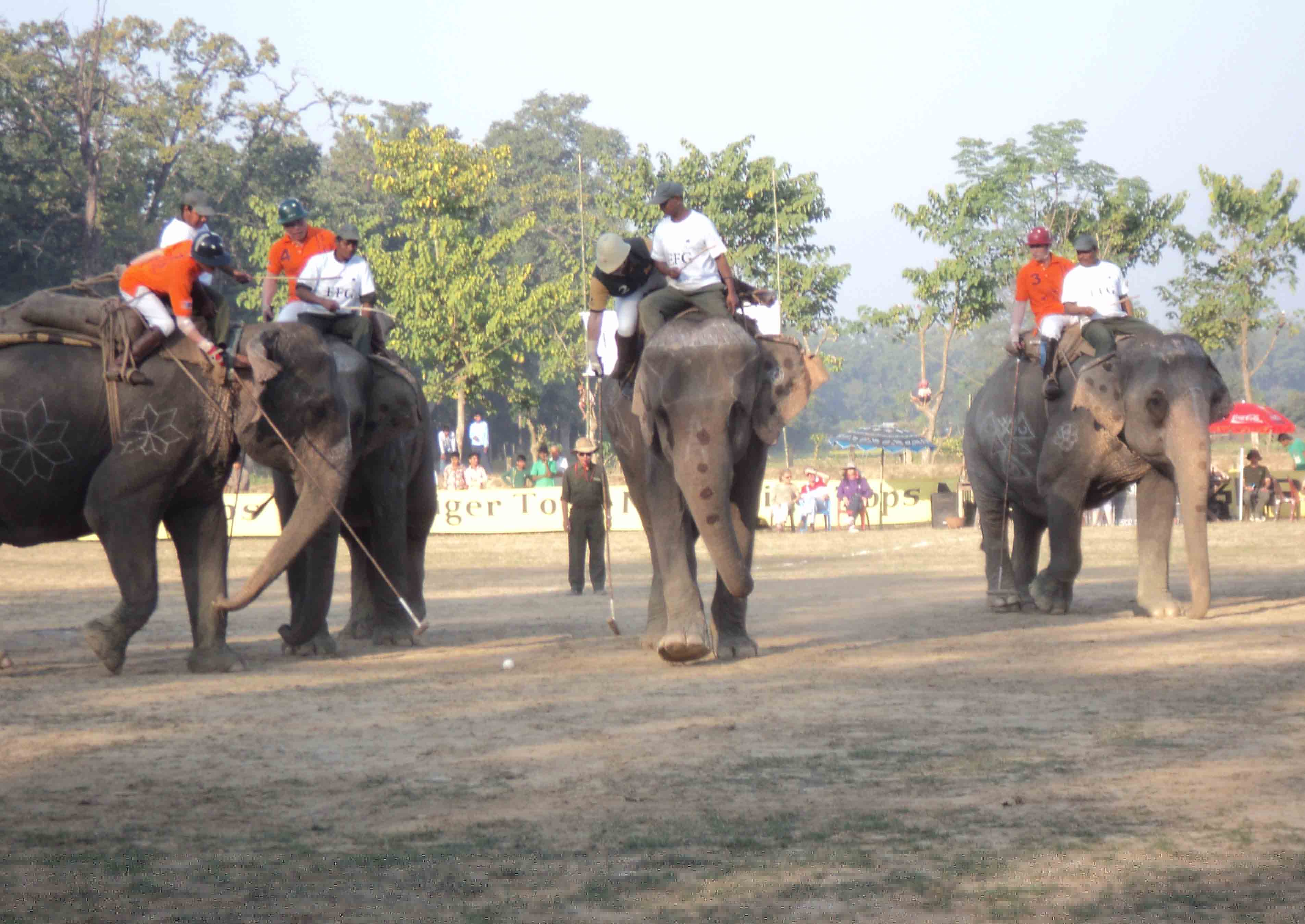 नेपाली: चितवनको मेघौलीमा आयोजित हात्ती पोलो